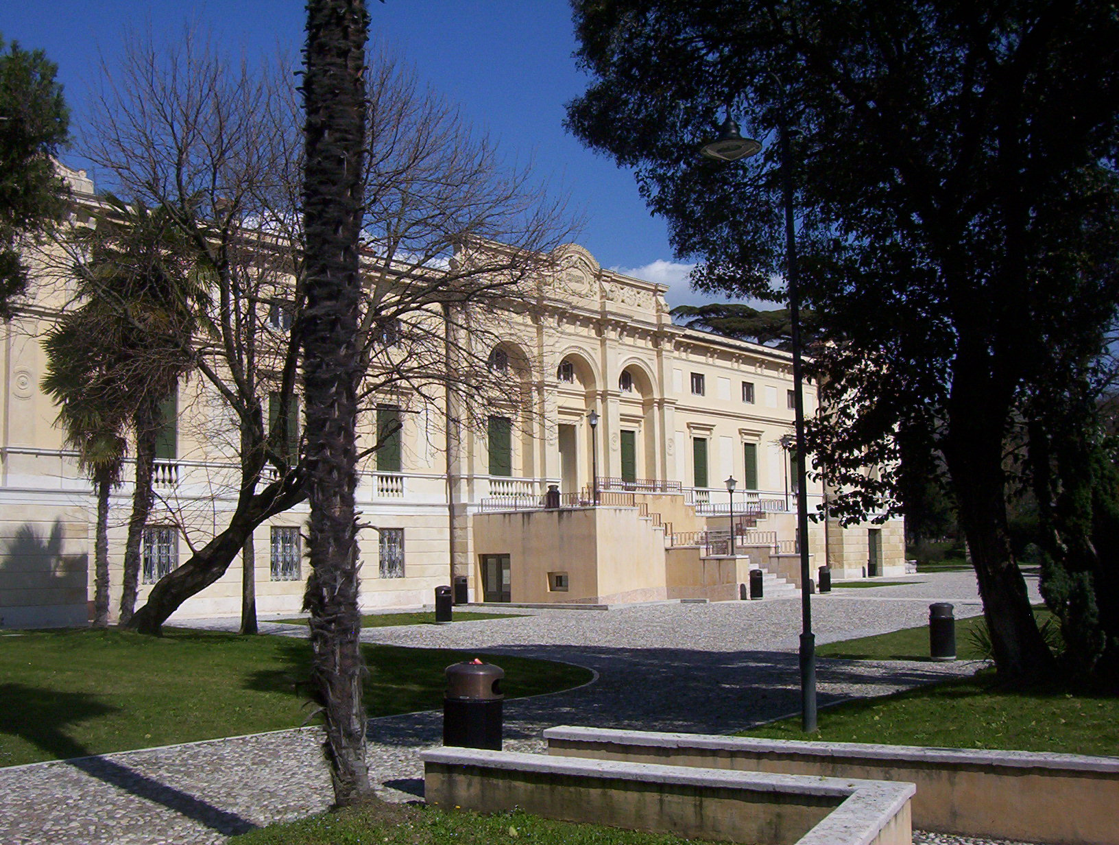 Facciata di Villa Lebrecht a San Floriano (comune di San Pietro in Cariano - Verona)